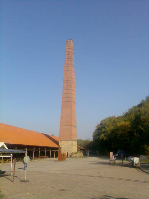 Schornstein der Ziegelei Dünkelberg auf dem Gelände des Museums Zeche Nachtigall